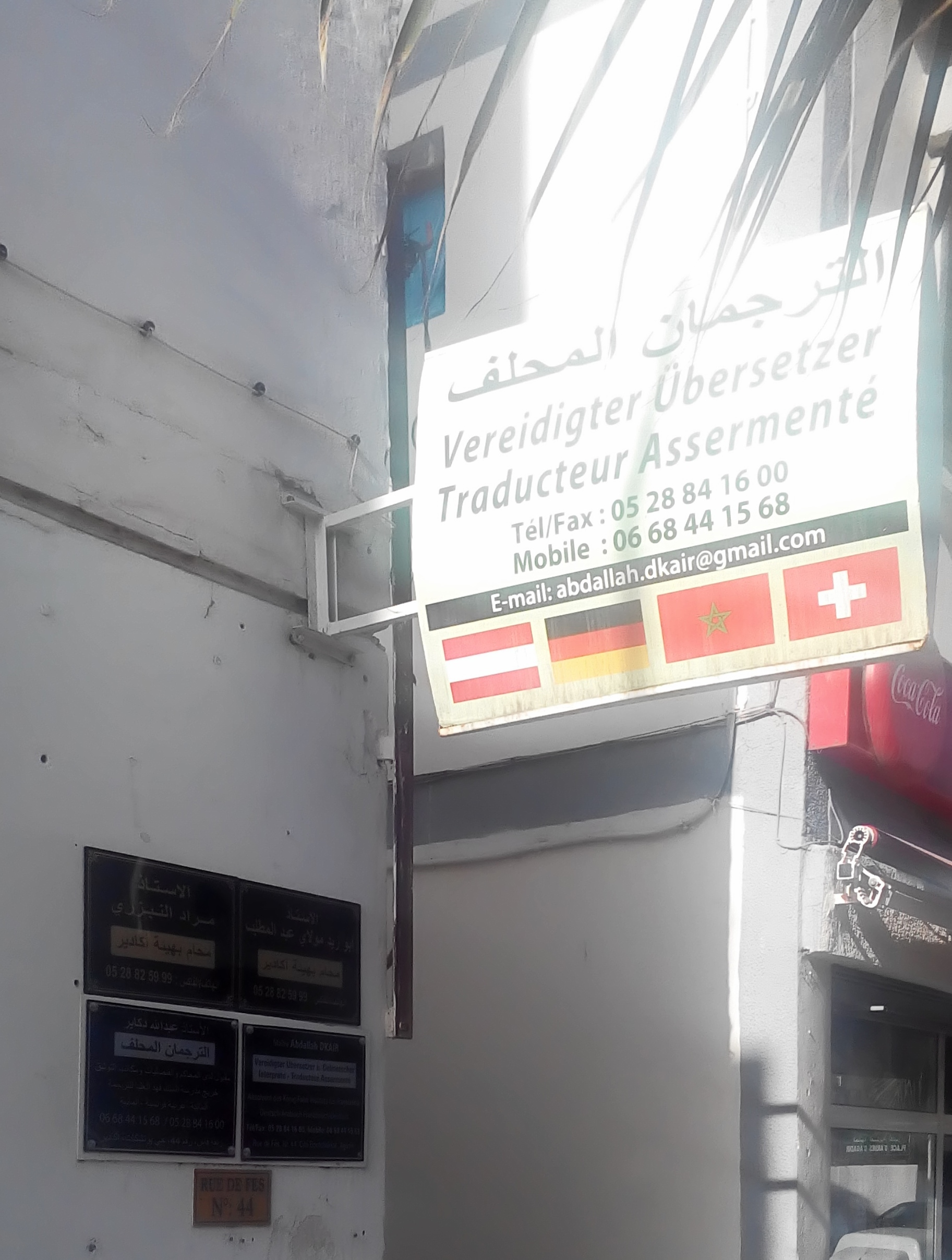 Agadir (2017), Sprachmittler